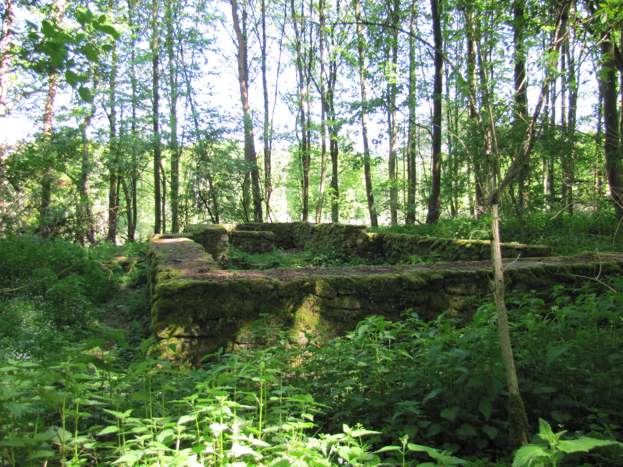 Wüstung Hausen bei Nieder-Bessingen Hessen, Deutschland